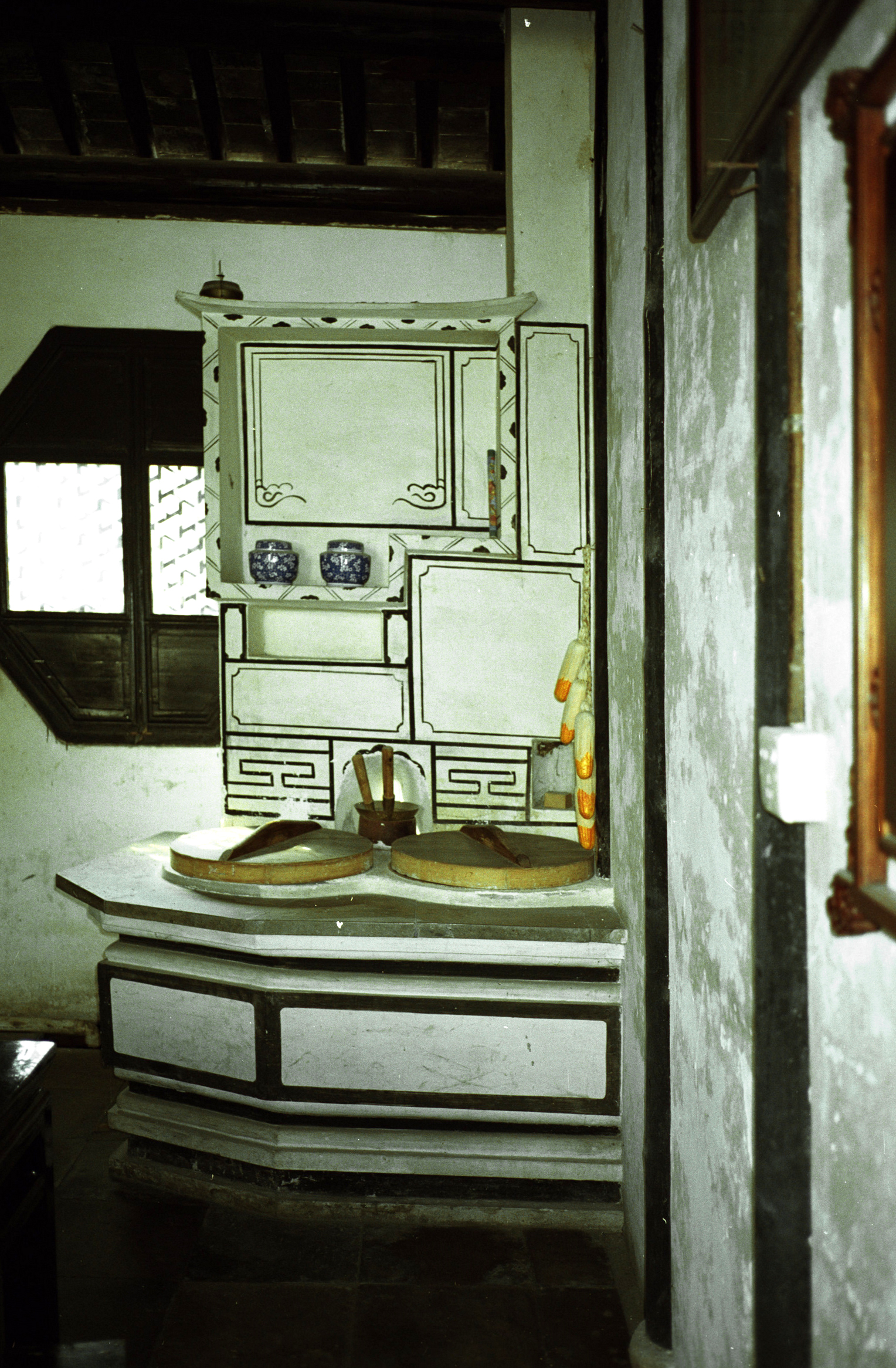 周庄灶头